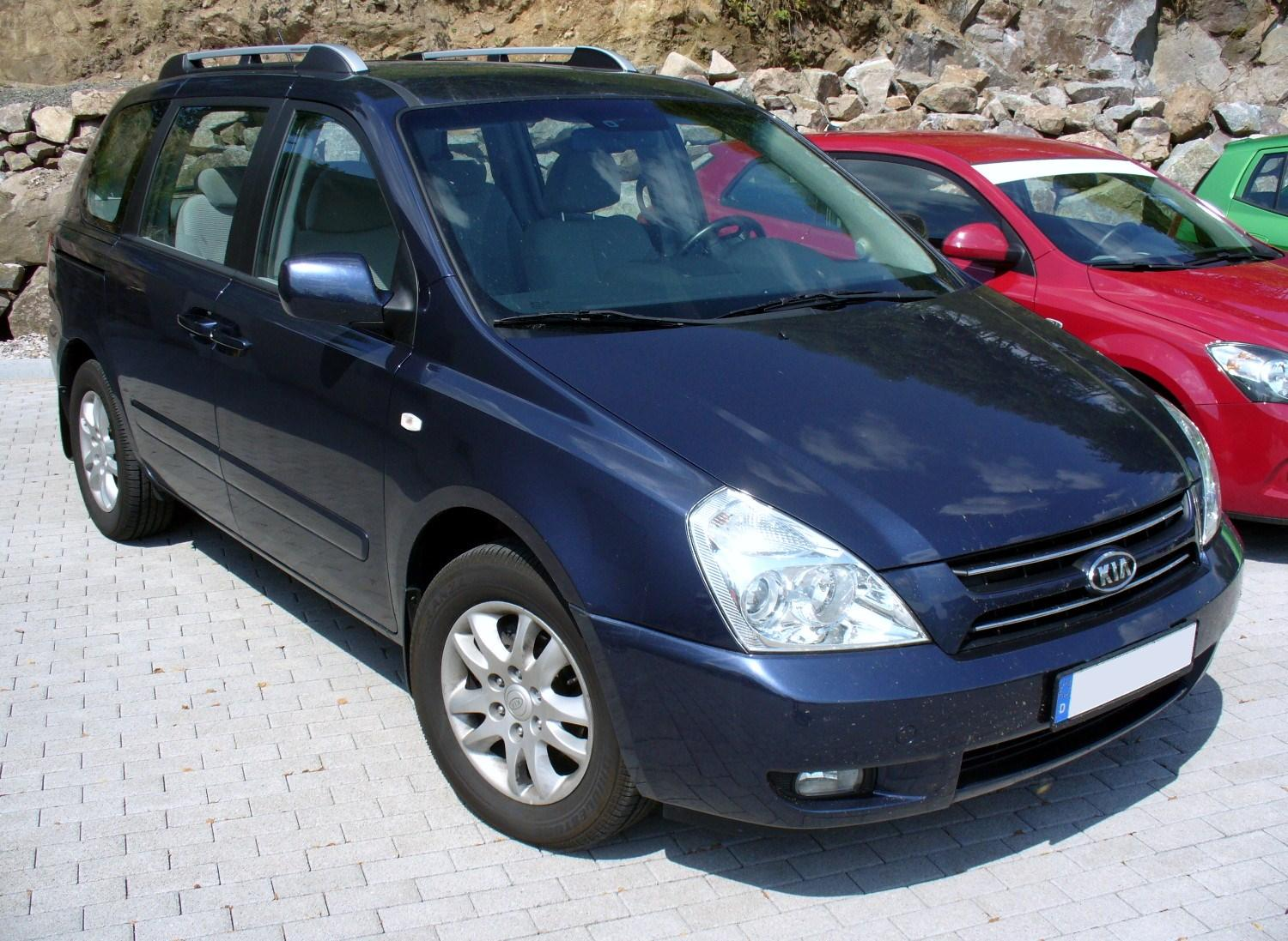 Kia Carnival